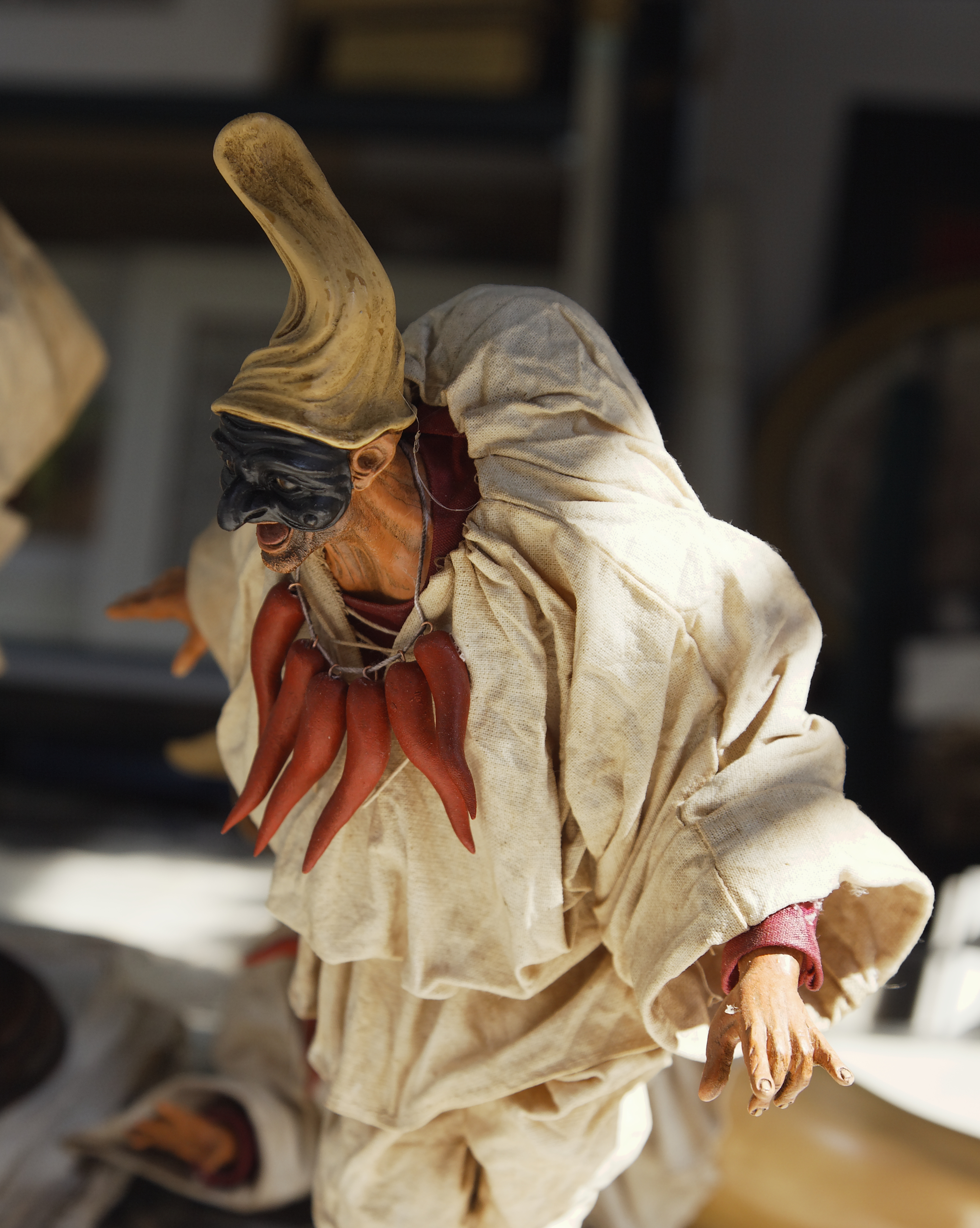 La maschera di Pulcinella, Napoli - Italia